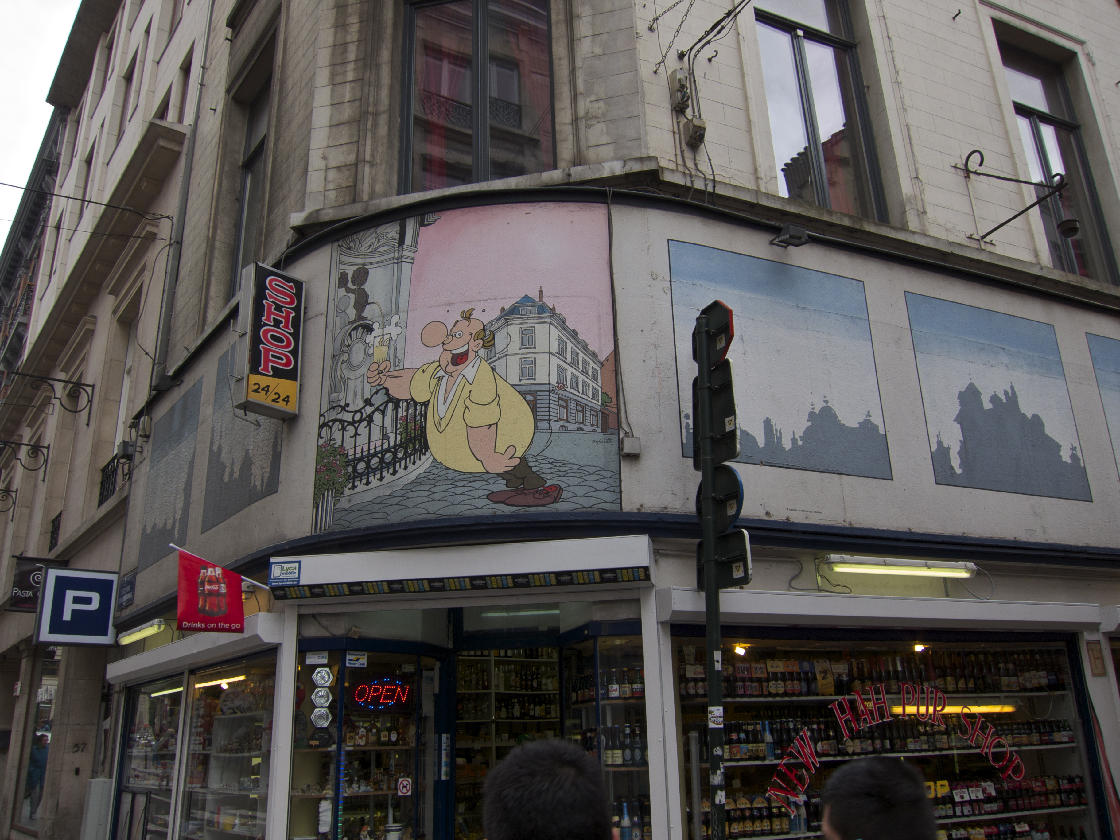 Stripmuur Tussen Pot en Pint te Brussel